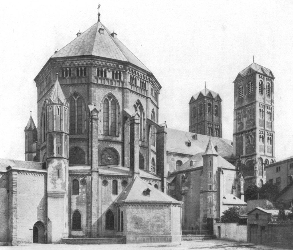 St. Gereon um 1914